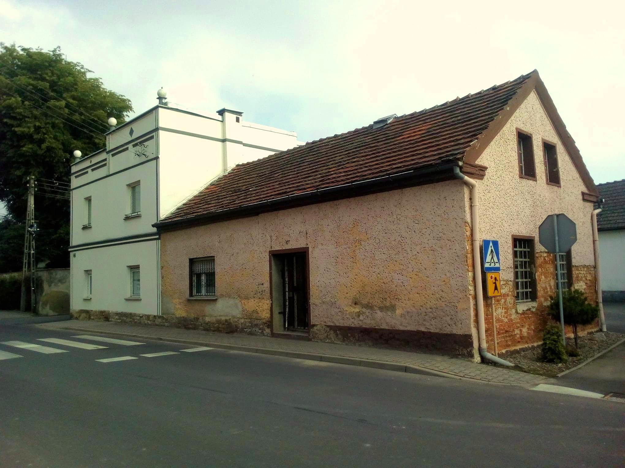 Budynek mieszkalny, dawna karczma i sklep